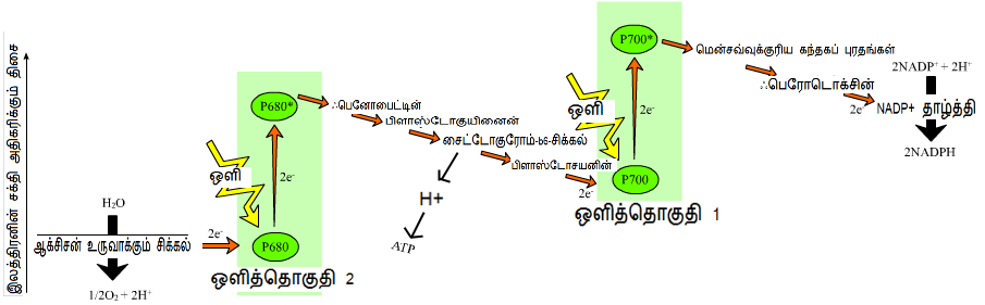 ஒளித்தொகுப்பு-z scheme